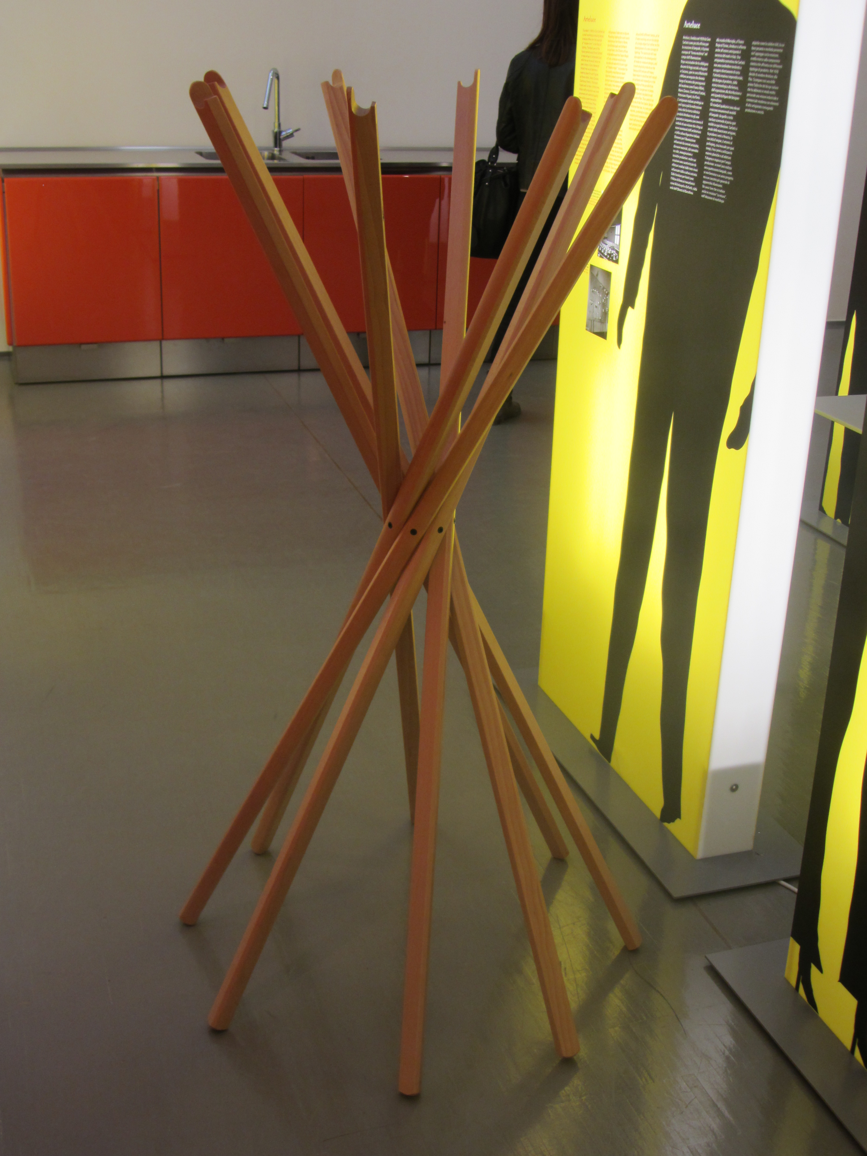 L'appendiabiti "Shangai" realizzato da De Pas, D'Urbino, Lomazzi per Zanotta nel 1973 e vincitore del premio Compasso d'Oro nel 1979. Appendiabiti chiudibile in legno